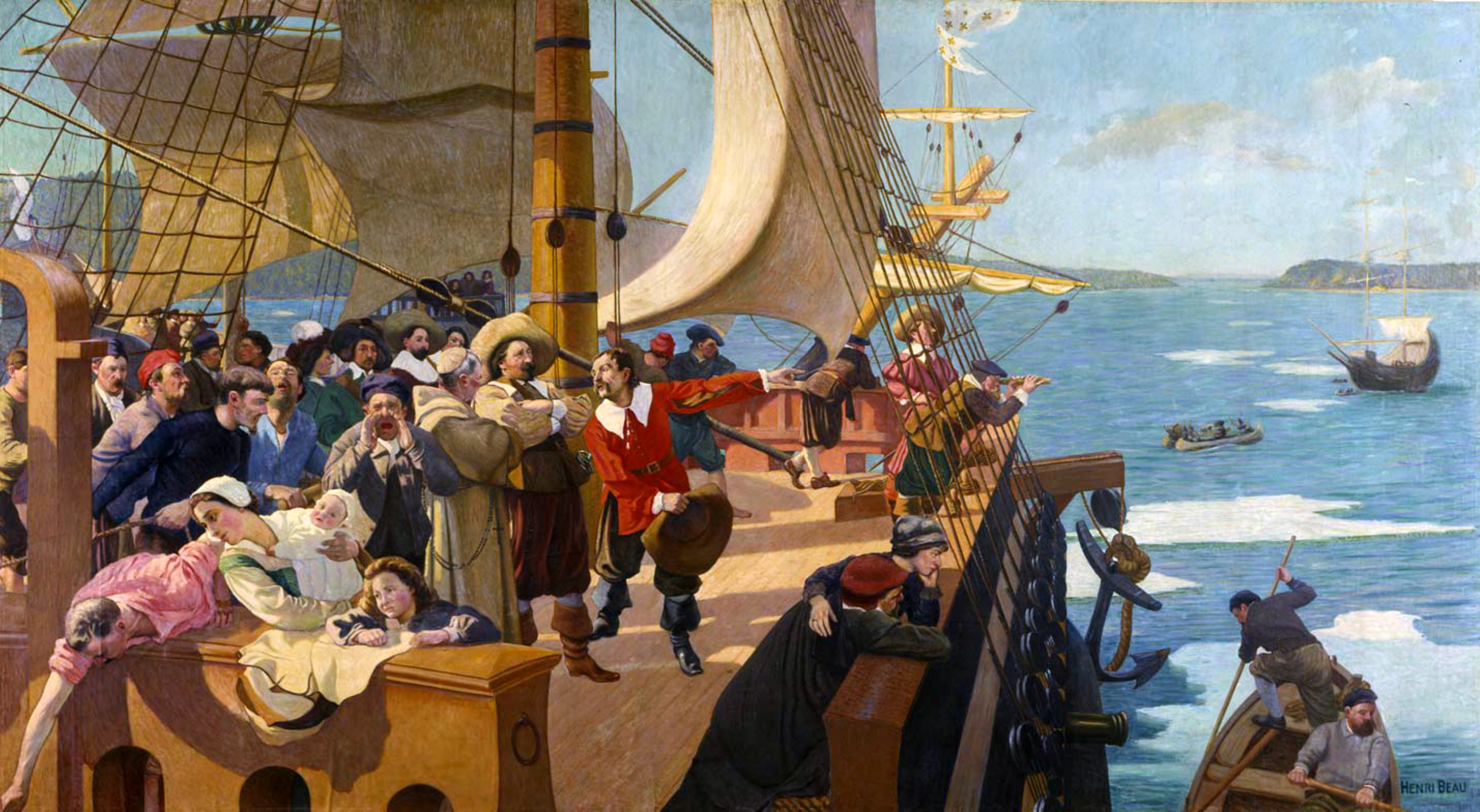 L'arrivée de Champlain à Québec, 1903, huile sur toile, 329 x 598 cm, Musée national des beaux-arts du Québec (34,04). Photo : Patrick Altman